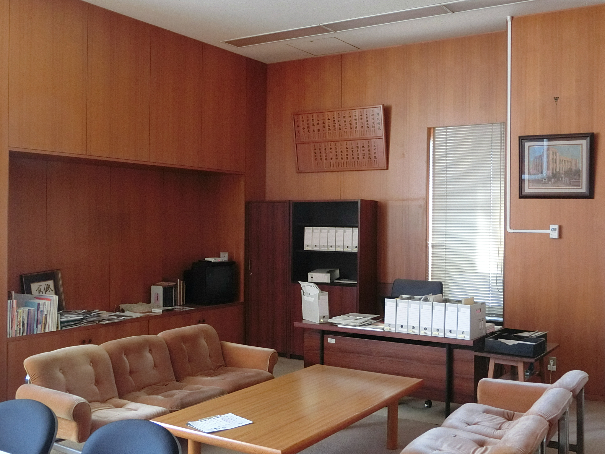 県立長野図書館の館長室。館長の許可を得て撮影。